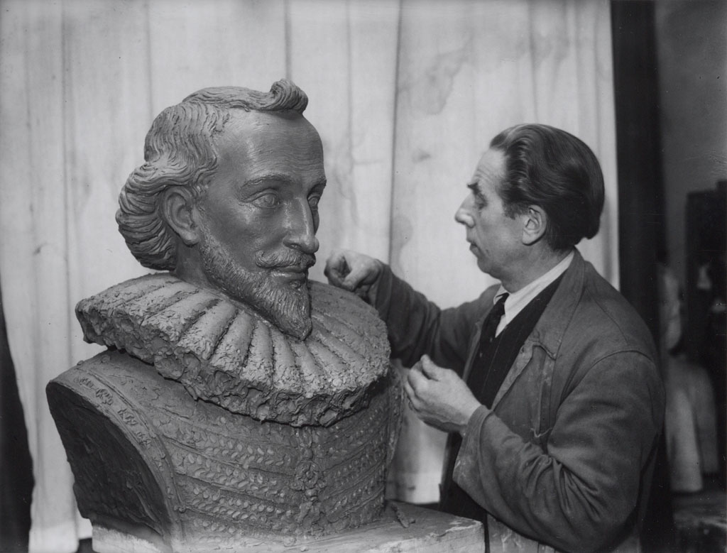 Beeldhouwer Frits Sieger met buste van P.C. Hooft, Amsterdam 22 maart 1947 Foto Ben van Meerendonk / AHF, collectie IISG